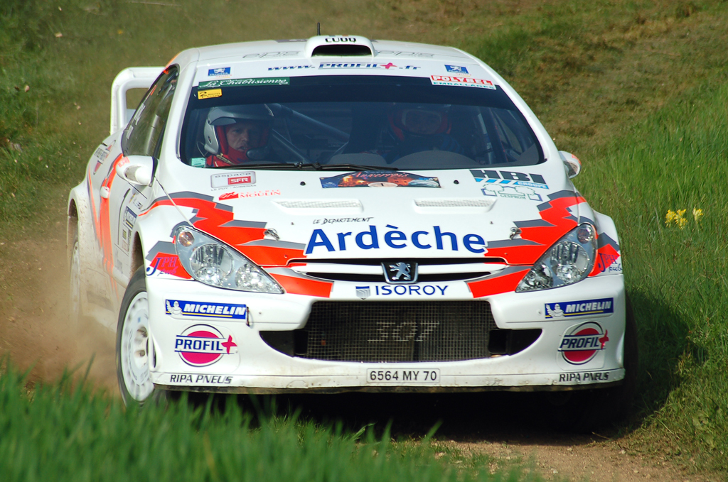 Jean-Marie CUOQ en 307 WRC au Rallye Terre de l'Auxerois 2007